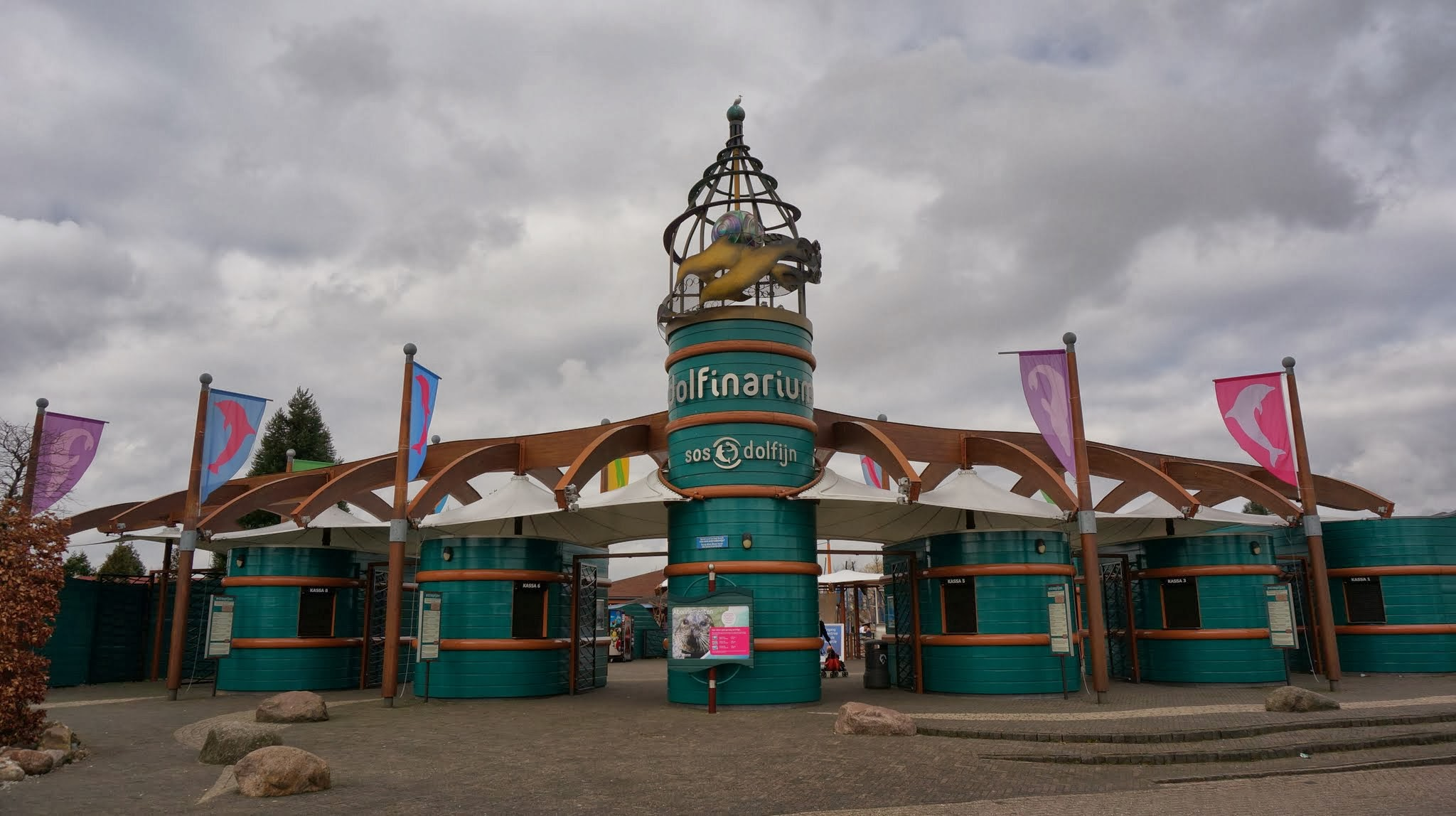 Binnenstad, 3841 Harderwijk, Netherlands